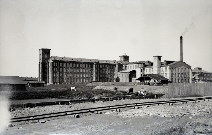 Балтийская мануфактура в 1910 году